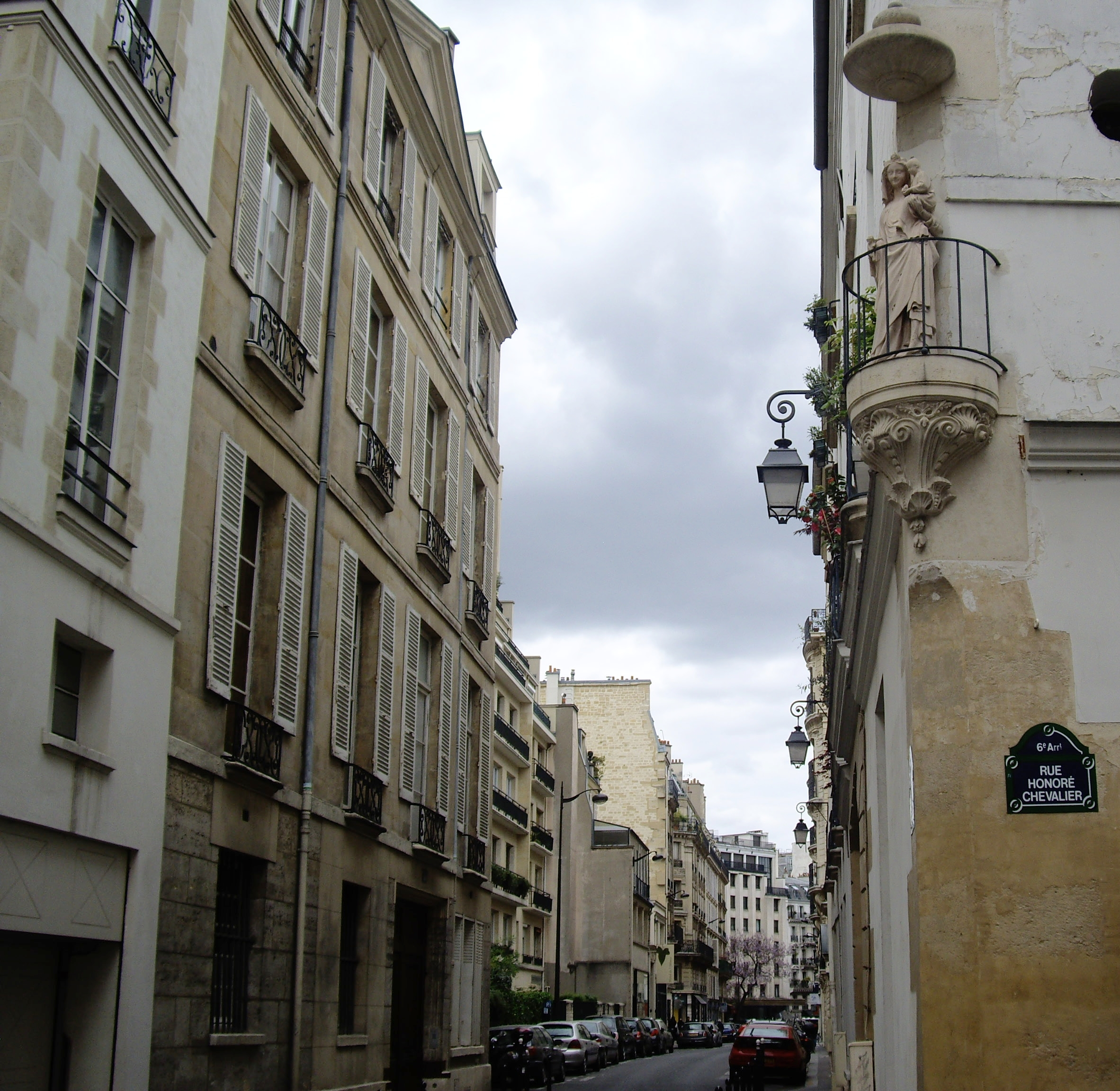 Rue Cassette, Paris 6e. Statue de la Vierge à l'Enfant à l'angle de la rue Honoré-Chevalier. Vue depuis la rue Honoré-Chevalier, vers la rue de Mézières.